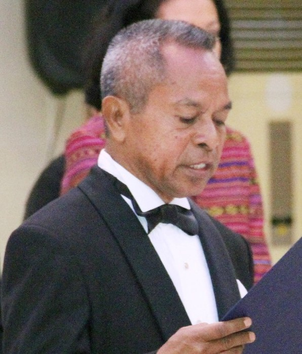 João Camara, osttimoresischer Botschafter in Myanmar erhält seine Akkreditierung